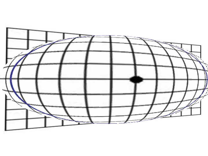 Modificado de File:Circulo 002 ttt.JPG, es otra modificación del plano contenedor (libre)